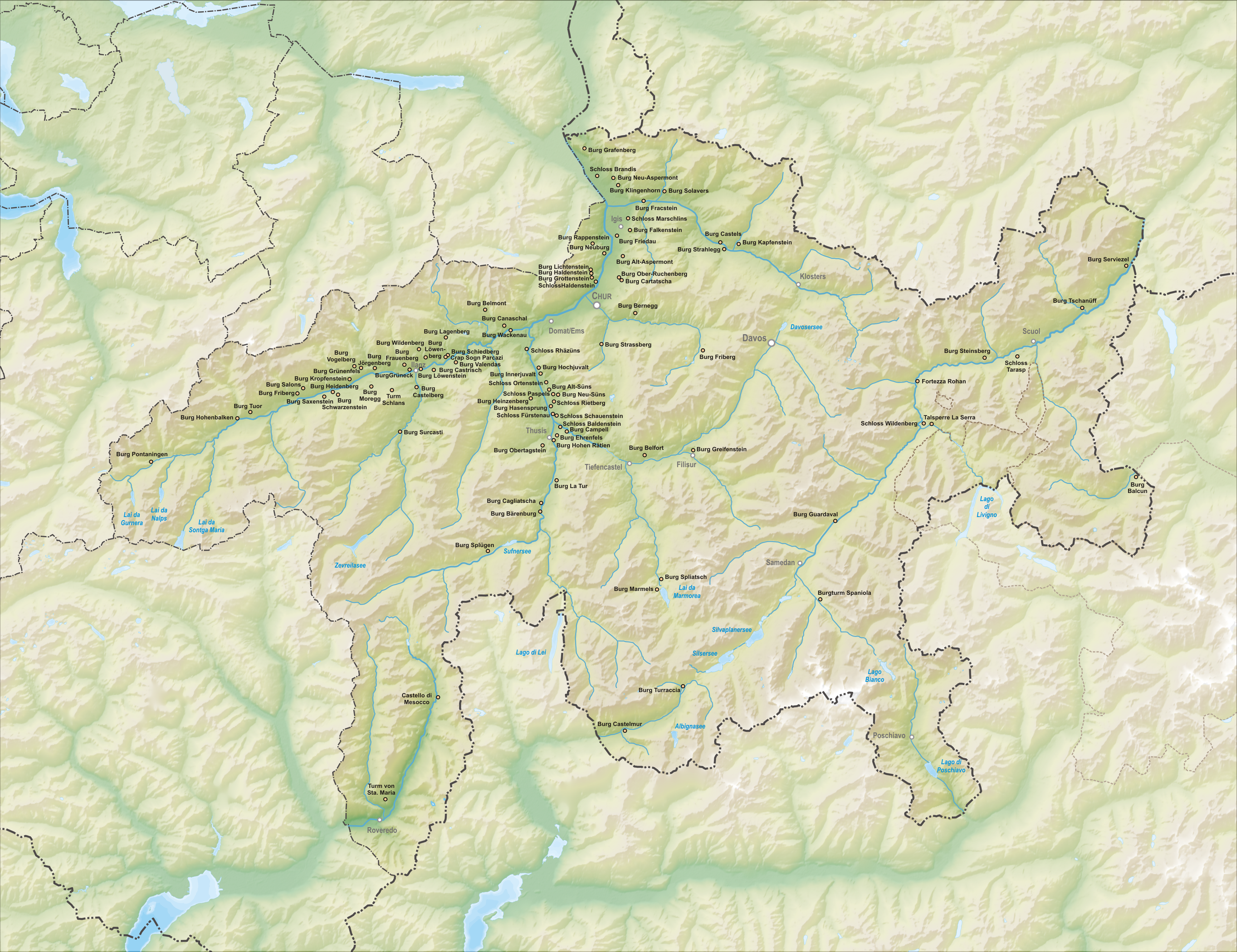 Karte der Burgen und Schlösser des Kanton Graubünden. Topographischer Hintergrund: NASA Shuttle Radar Topography Mission (public domain). SRTM3 v.2.